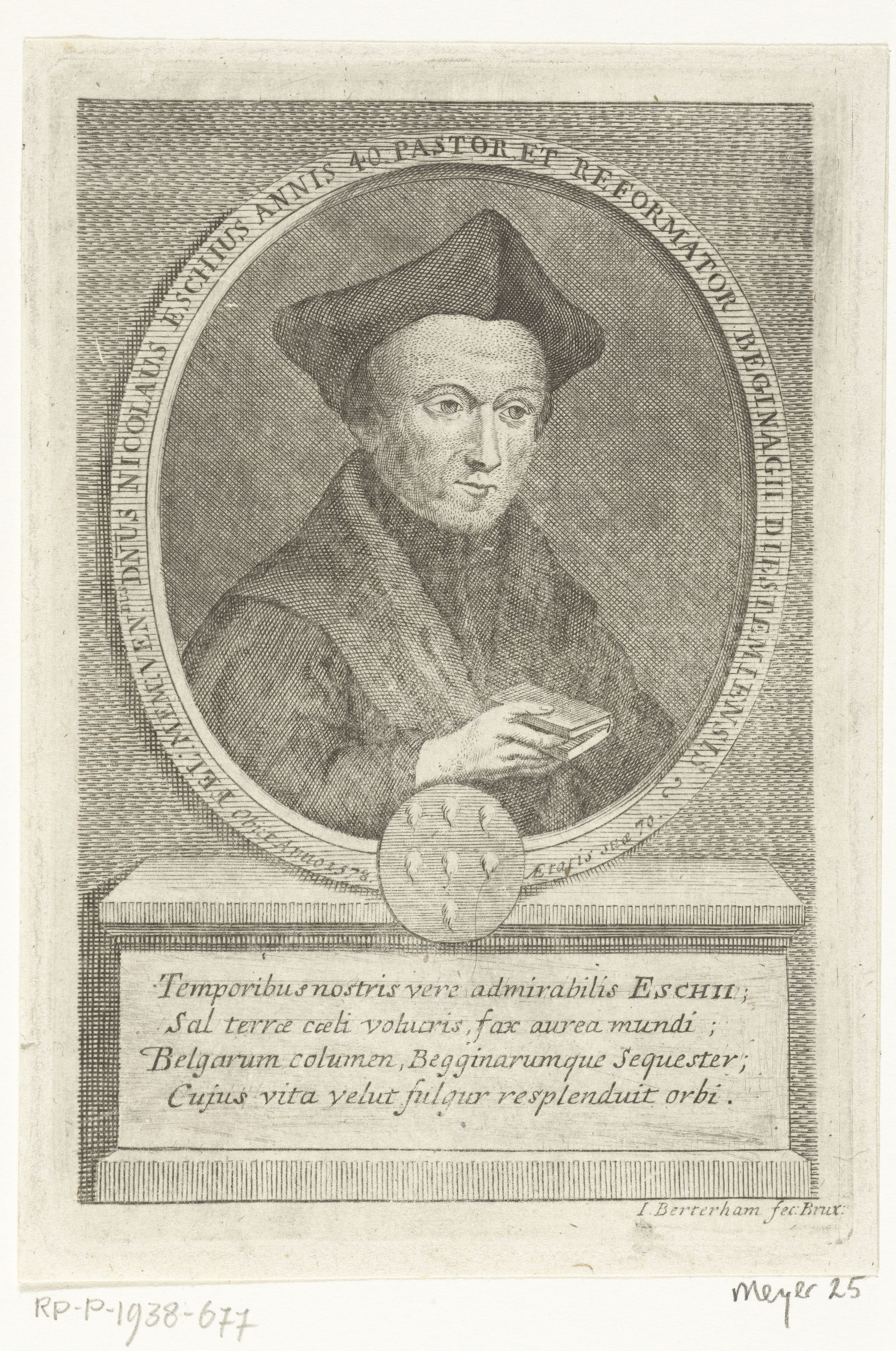 IdentificatieTitel(s): Portret van priester Nicolaus van EschFel mem vendus (...) reformator beginagii diestemiensis (titel op object)Objecttype: prent Objectnummer: RP-P-1938-677Catalogusreferentie: Nagler/Meyer 25Opschriften / Merken: verzamelaarsmerk, verso midden, gestempeld: Lugt 2228Omschrijving: Portret van priester Nicolaus van Esch (Eschius) op 40-jarige leeftijd in ovale omlijsting met gedicht over zijn bewonderensWaar: dige werk.VervaardigingVervaardiger: prentmaker: Jan Baptist Berterham (vermeld op object)Plaats vervaardiging: BrusselDatering: 1696 - 1721Fysieke kenmerken: gravureMateriaal: papier Techniek: graveren (drukprocedé)Afmetingen: plaatrand: h 144 mm × b 98 mmVerwerving en rechtenCredit line: Schenking van de heer D.H. Cevat, GuernseyVerwerving: schenking 1938Copyright: Publiek domein